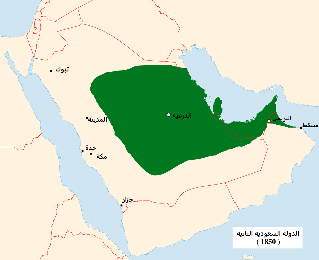 الدولة السعودية الثانية (1850 )